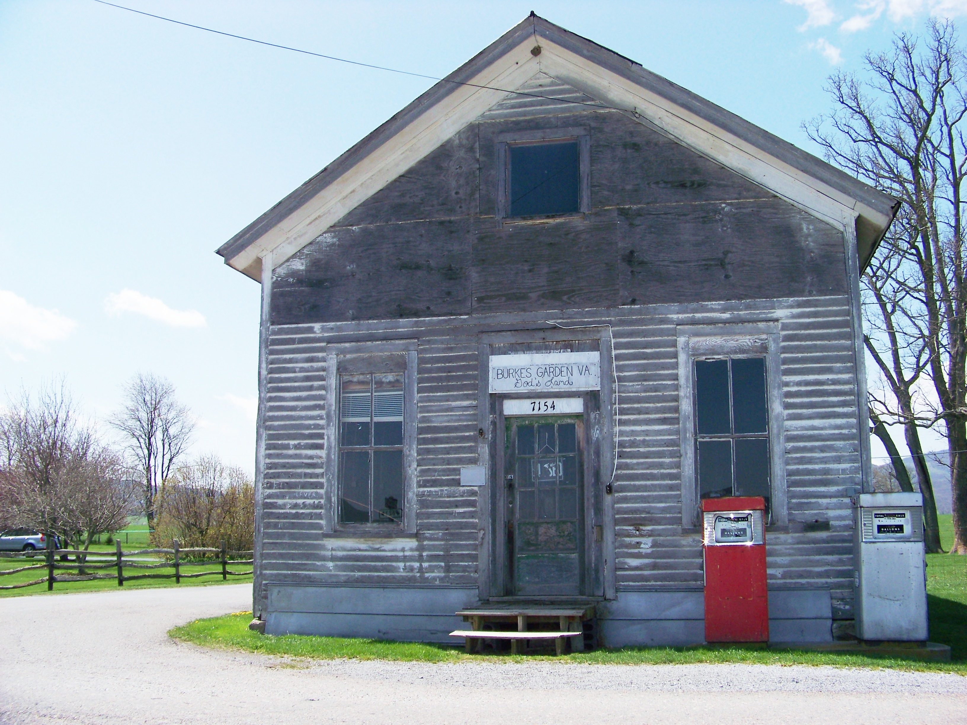 Burkes Garden, VA - God's Land